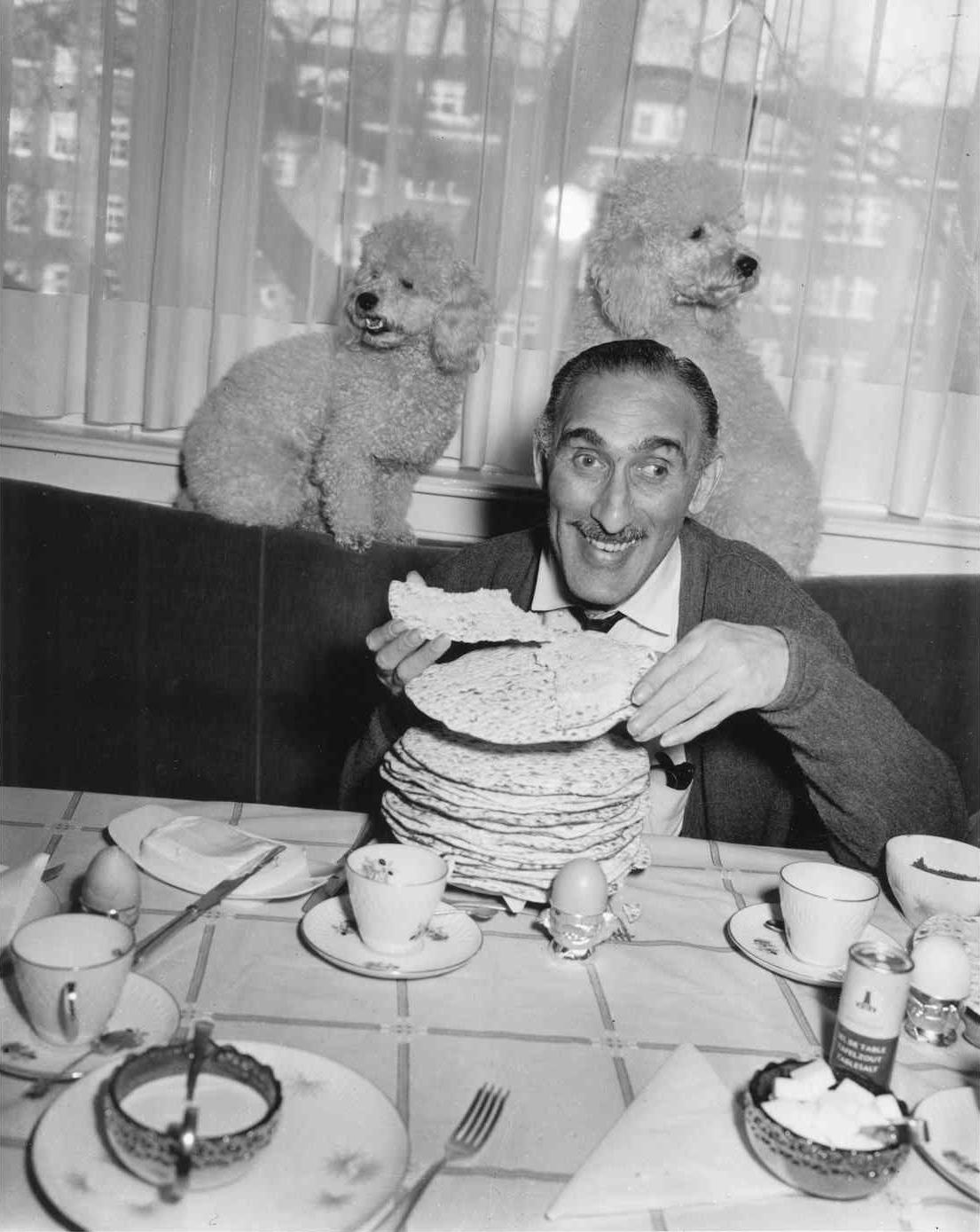 Max Tailleur na ziekenhuisopname wegens maagklachten weer thuis aan het ontbijt, Amstelkade 172, Amsterdam, 27 januari 1963 Foto Ben van Meerendonk / AHF, collectie IISG, Amsterdam